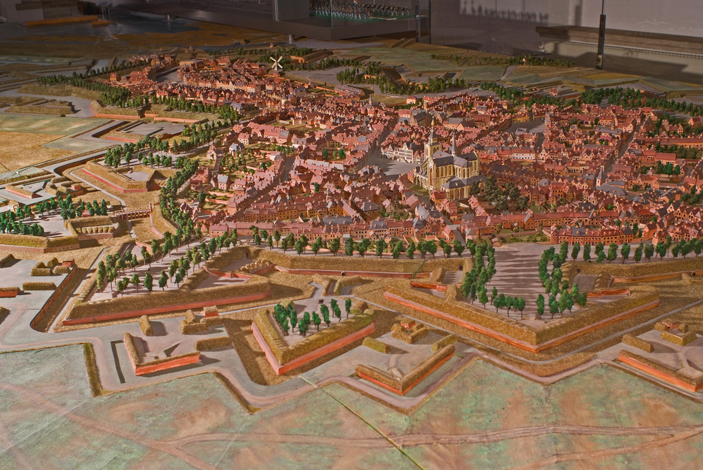 Maquette Bergen op Zoom 1747 (Sterkste vesting van de Republiek de Verenigde Nederlanden)